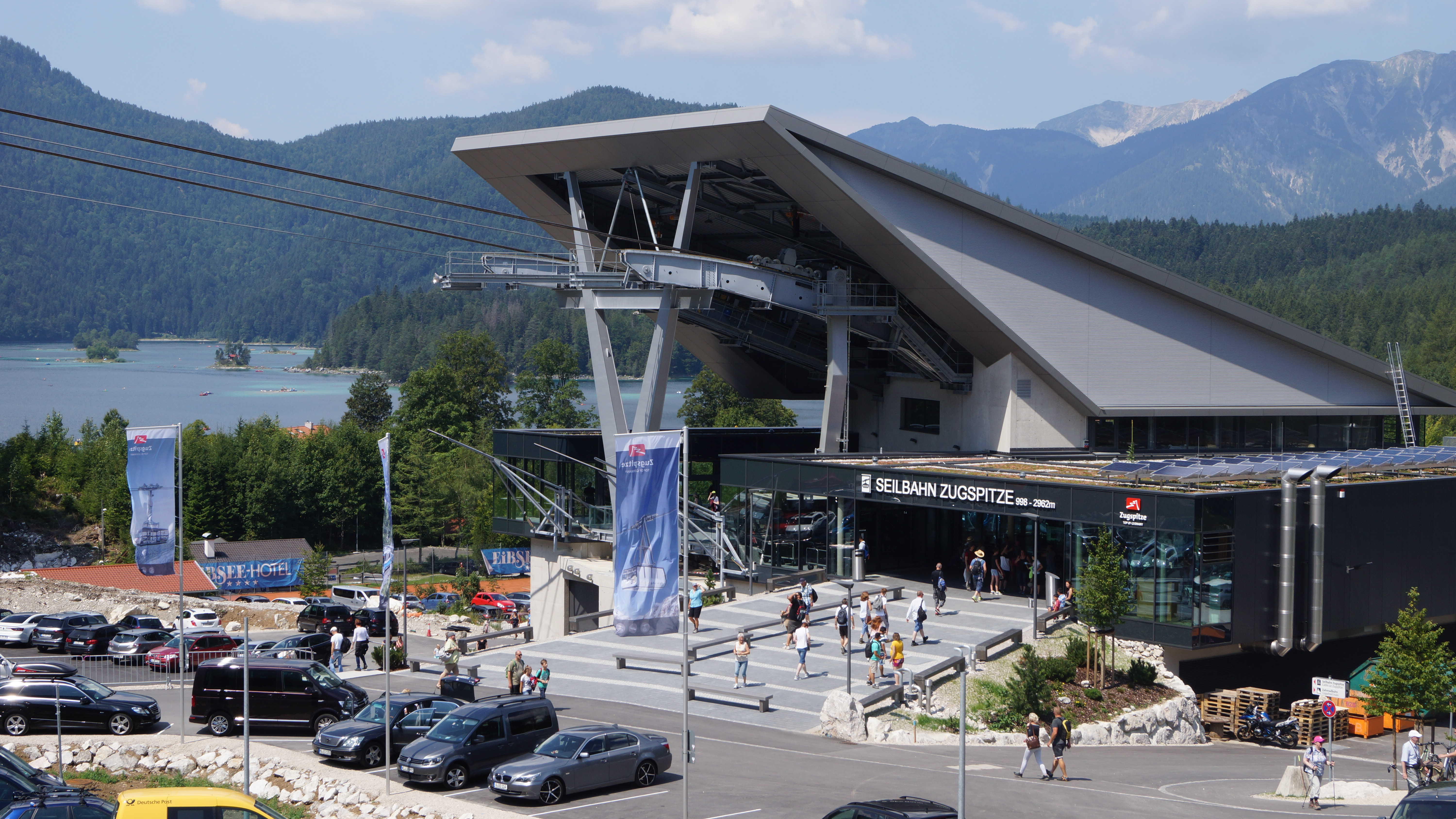 Talstation der Seilbahn Zugspitze am Eibsee.